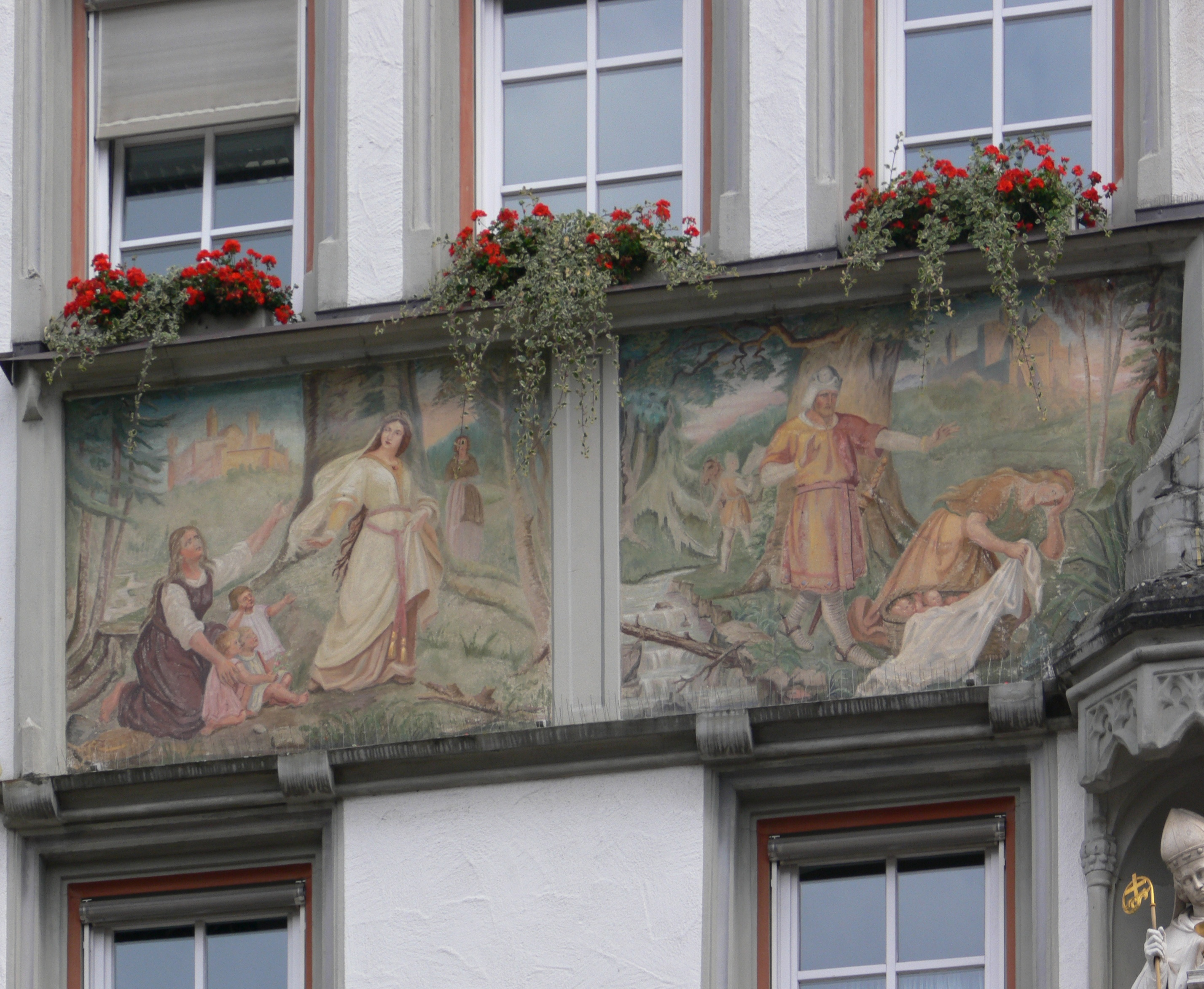 Weingarten (Württemberg), Amtshaus, Kirchstraße 2, Fassadendetail: Welfensage